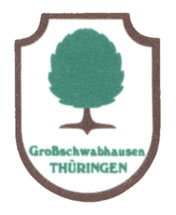 Wappen der GEmeinde Großschwabhausen